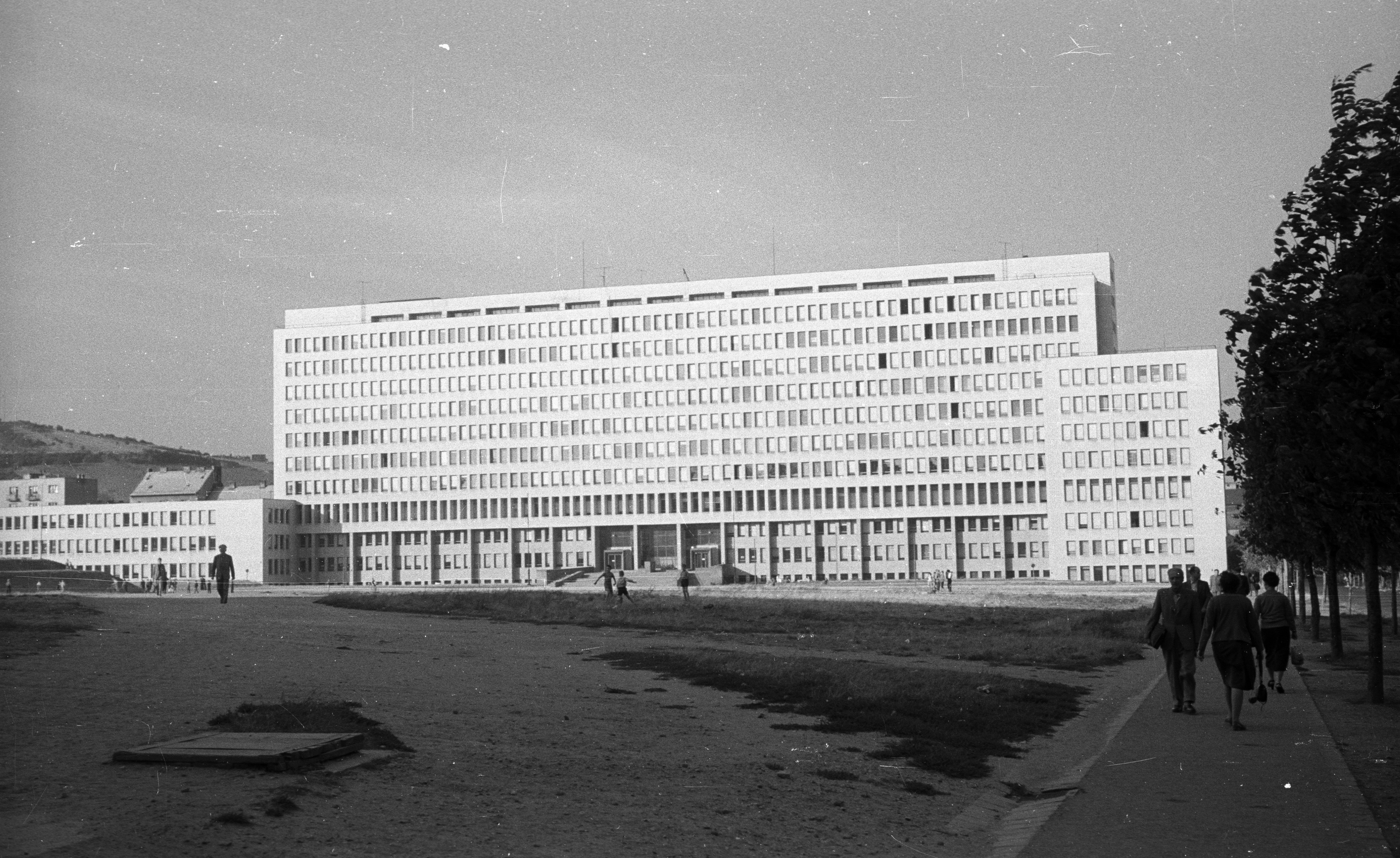 námestie Slobody (Gottwaldovo tér, egykor Esterházy tér), Postapalota. Location: Slovakia, Bratislava Tags: Czechoslovakia, street view, modern architecture Title: námestie Slobody (Gottwaldovo tér, egykor Esterházy tér), Postapalota.